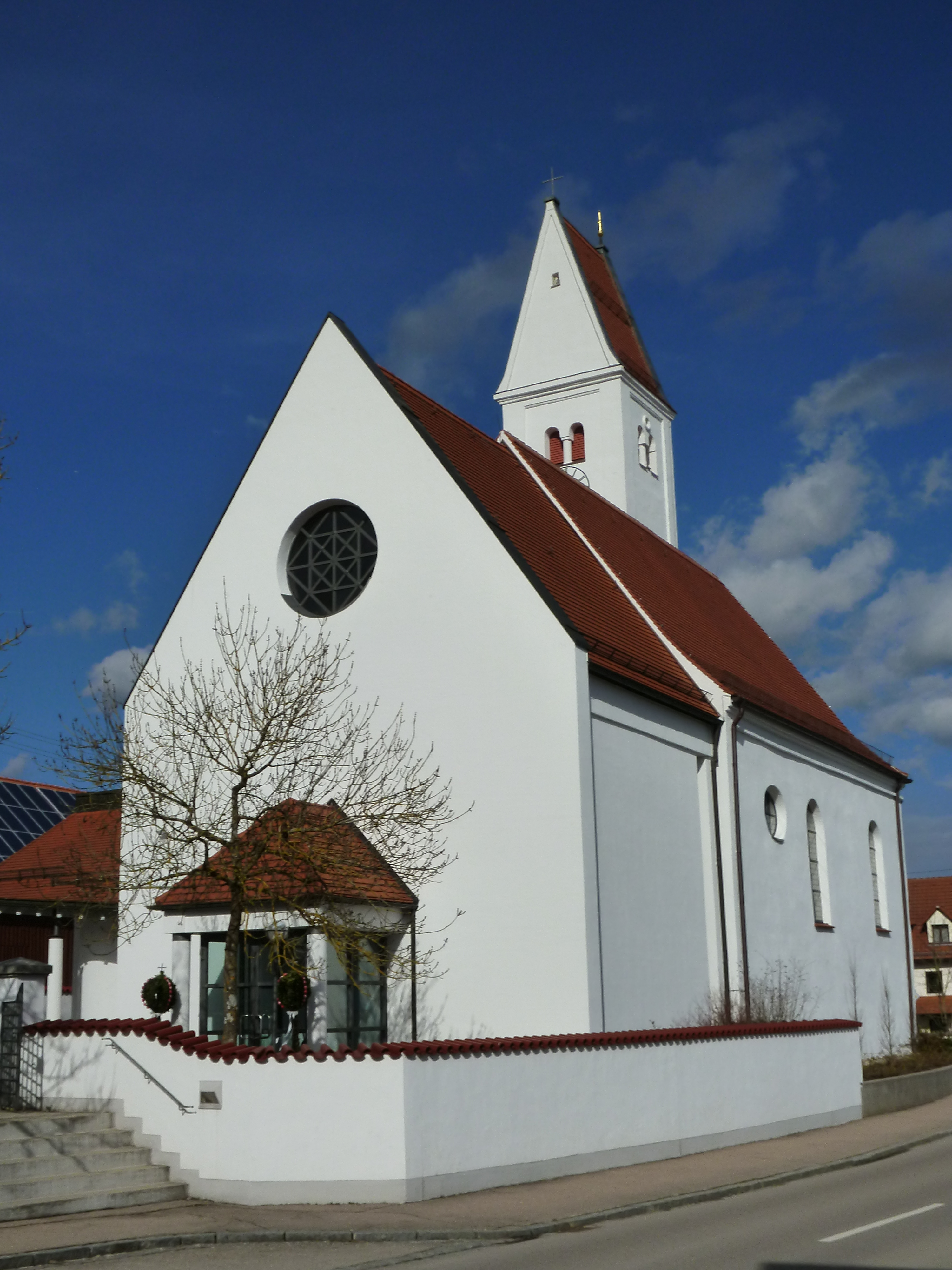 Katholische Pfarrkirche St. Georg; Langhaus 1609, Chor und Turm 1612 von Elias Holl, 1641 erneuert, 1761 innen umgestaltet; Außenansicht